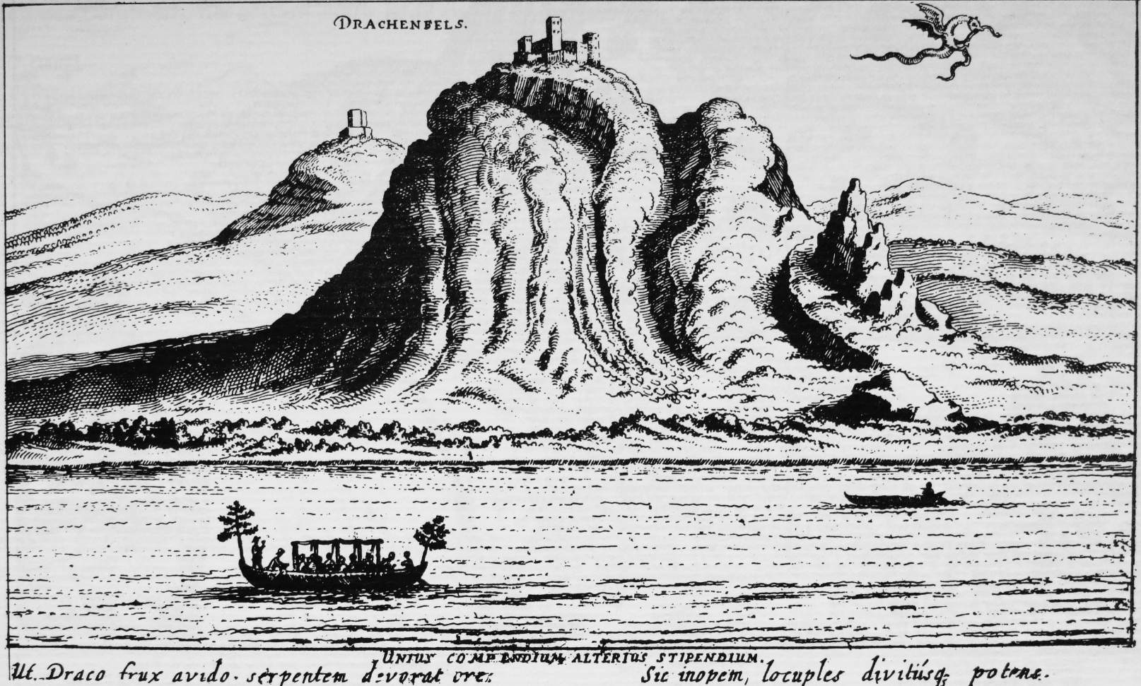 Kupferstich aus Matthäus Merians Frühzeit aus einer Folge mit zwölf Blättern mit rheinischen Burgen zeigt den Drachenfels (mit noch unzerstörter Burg) und die noch vorhandene Burg Wolkenburg nahe Königswinter, Nordrhein-Westfalen. Rutschen zum Abtransport der Steine aus den Steinbrüchen sind gut zu erkennen. Die Abbildung von Burg Wolkenburg ist vermutlich die einzige mit einer gewissen Verlässlichkeit. Die früheste Ansicht des Drachenfels von der Rheinseite.